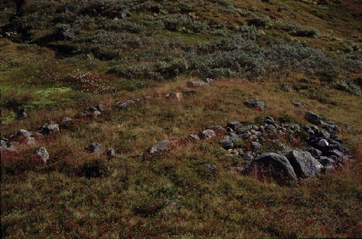 Tuft 7 på Svolset i Friksdalen. Støl med dateringar frå 200-talet til rundt år 1000.